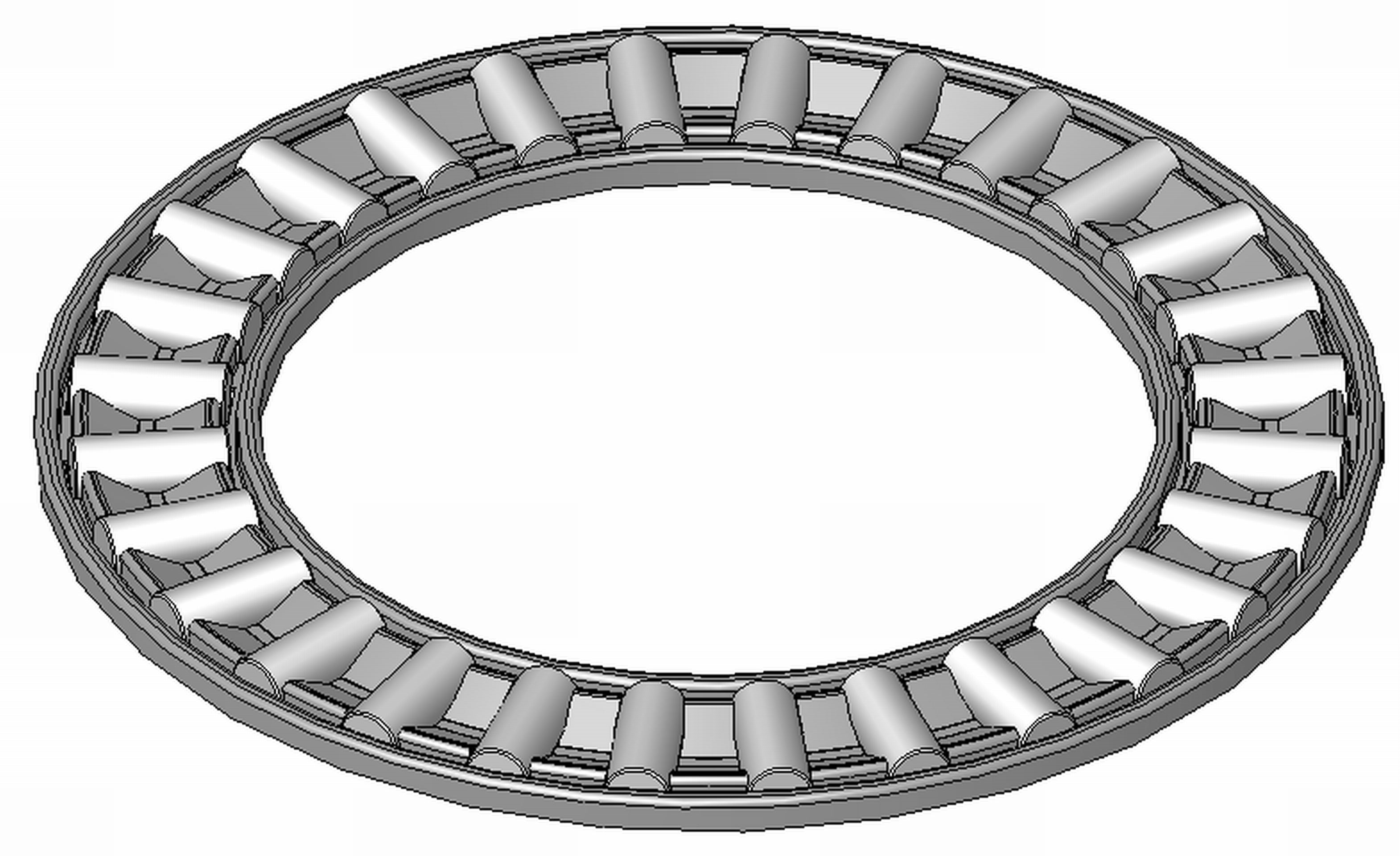 Axial-Nadelkranz, Blechkaefig aus Stahl Hinweis: Werkstoff des Kaefigs ist nicht genormt und bleibt dem Hersteller ueberlassen rolling contact bearings